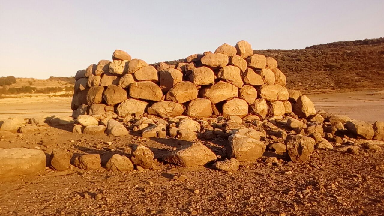 Nuraghe Chessedu, eccezionalmente riemerso dal fondo del lago artificiale Cuga (a Uri, in provincia di Sassari) in occasione della siccità del 2017. Foto scattata il 21 agosto 2017